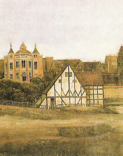 Ansicht des Gießhauses auf dem Friedrichswerder bei Berlin.